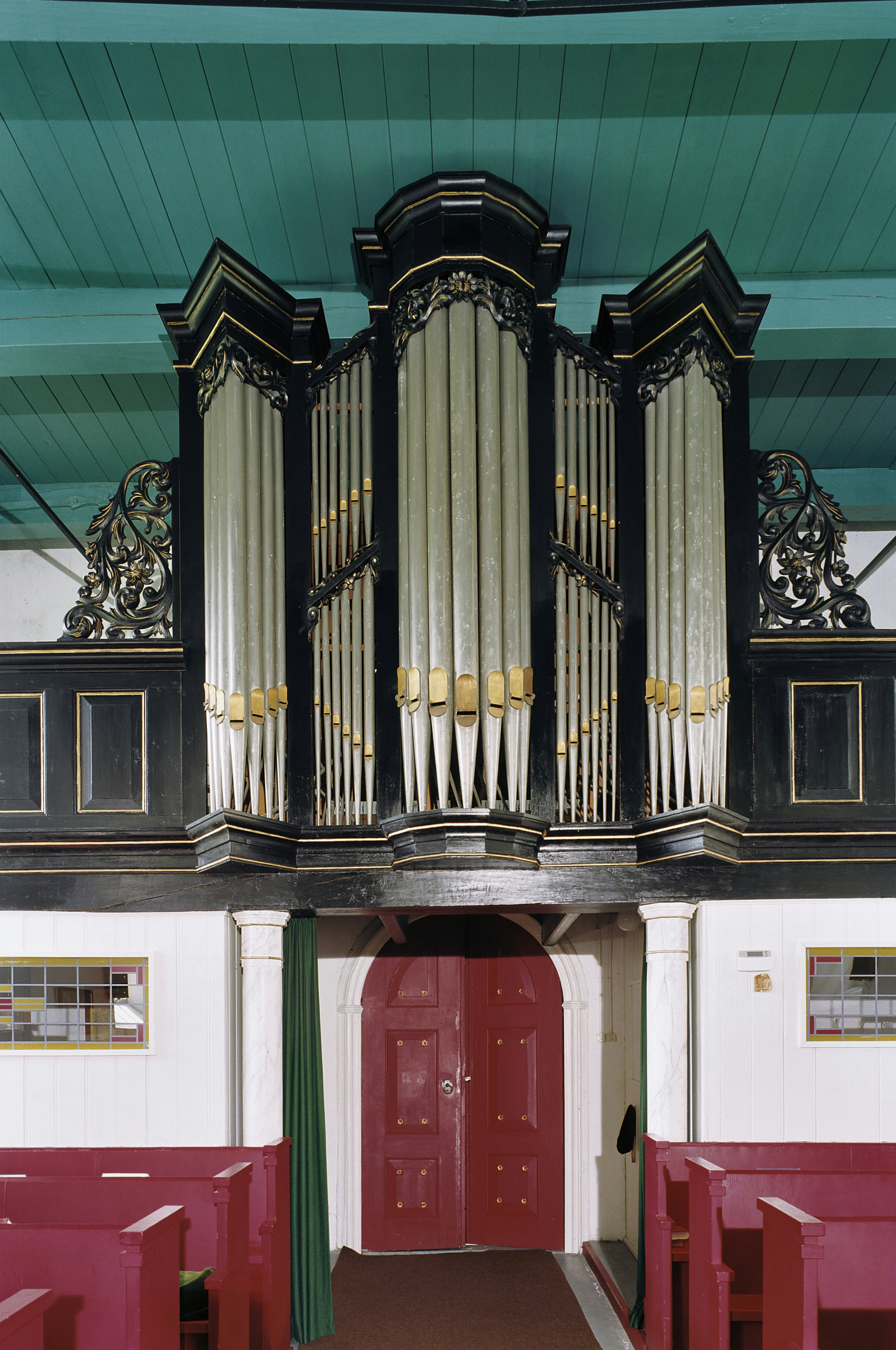 Nederlands Hervormde Kerk: Interieur, orgel